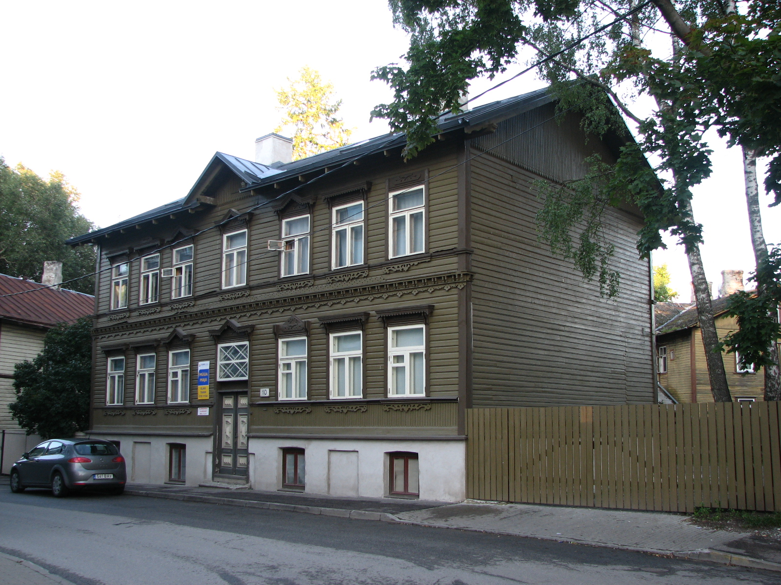 Elamu Ravi tn 10 Tallinnas 20. sajandi algusest